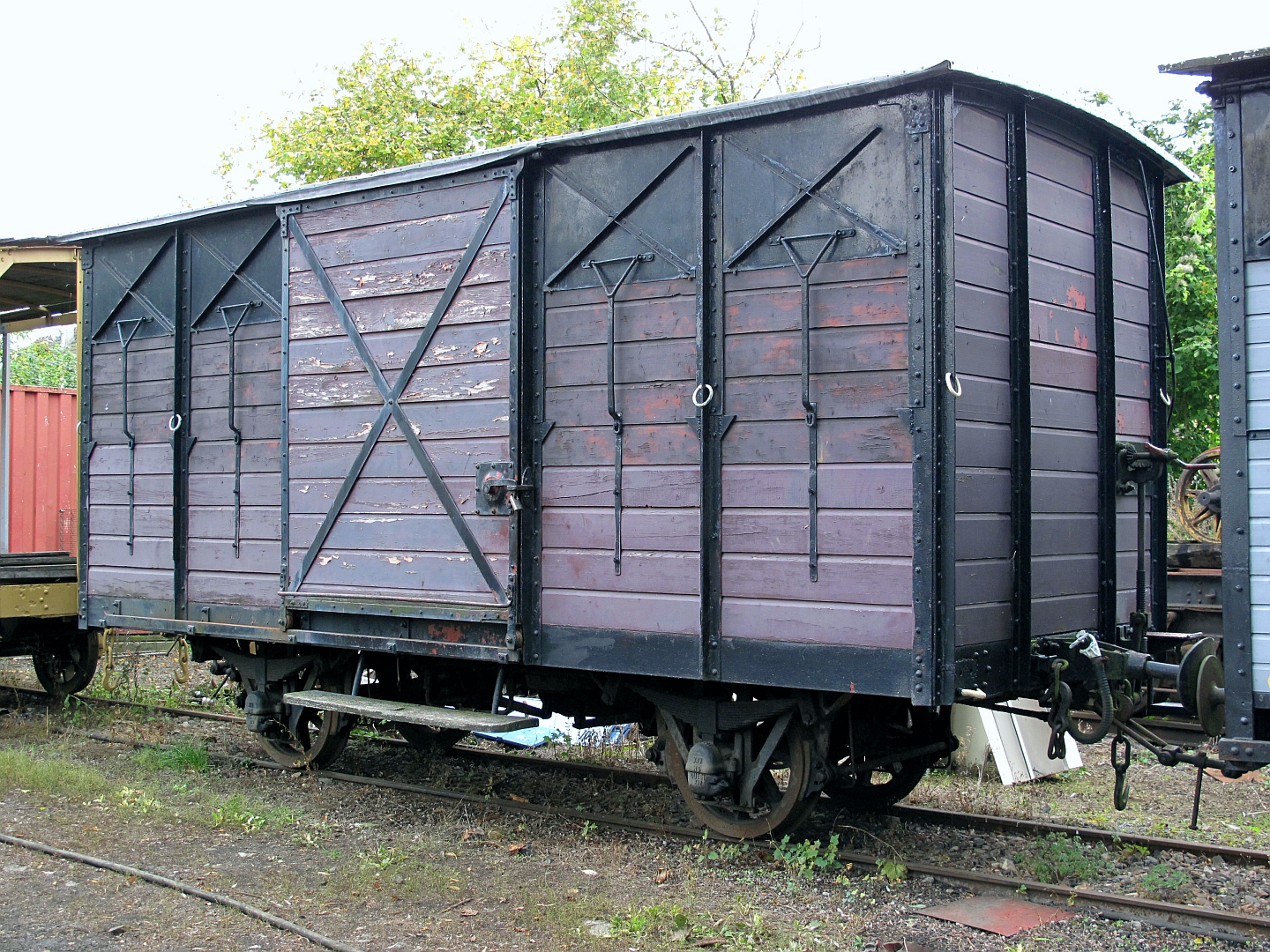 Le wagon couvert Kf 1457 ex-Réseau Breton au Musée des tramways à vapeur et des chemins de fer secondaires français, à Butry-sur-Oise le 03/10/2010.